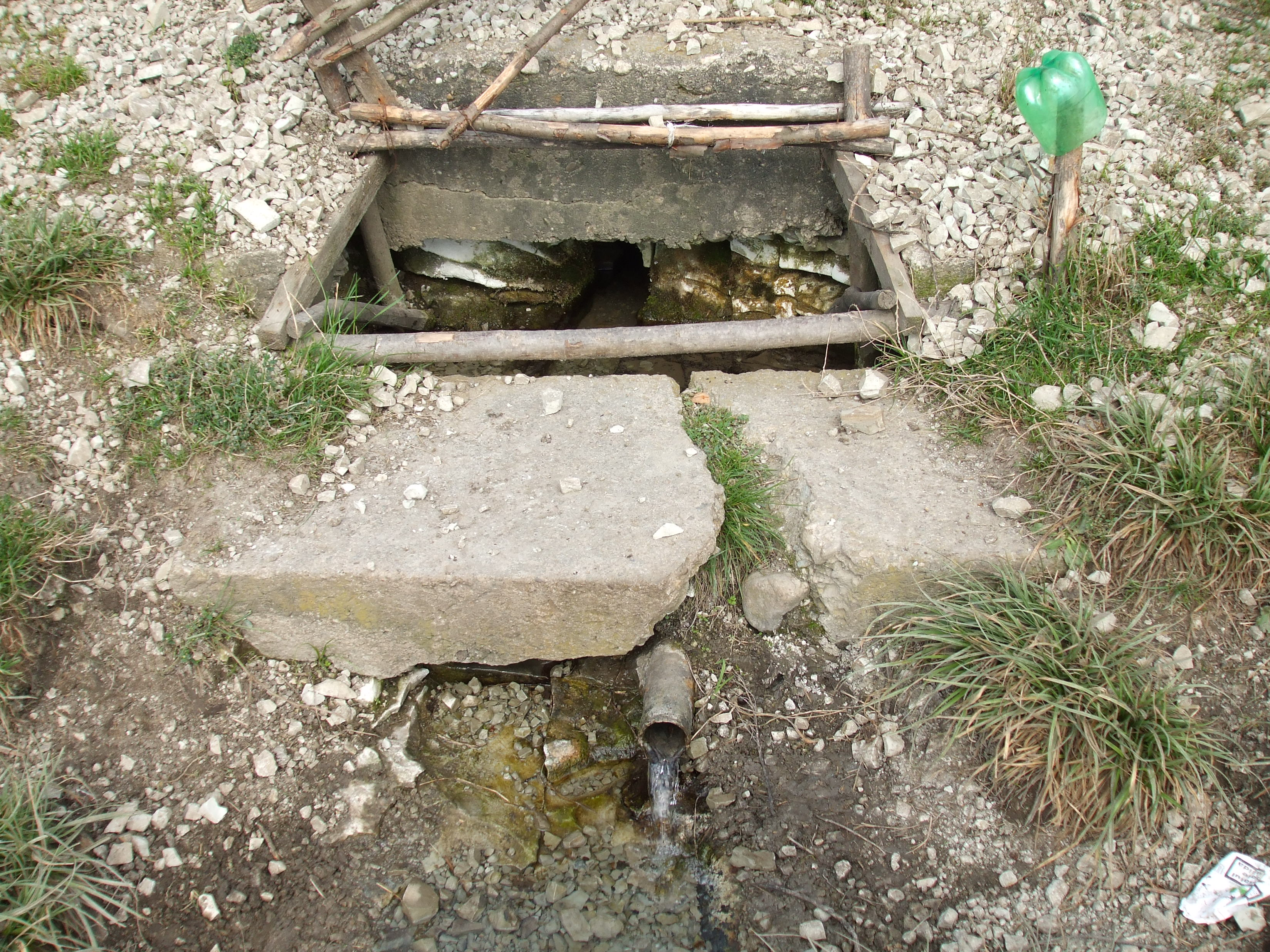 Imagini din Aruncuta-Izvoare cu apa potabila la suprafata